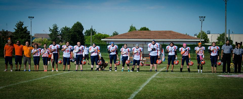 La squadra delle Lobsters durante l'inno al Rose Bowl